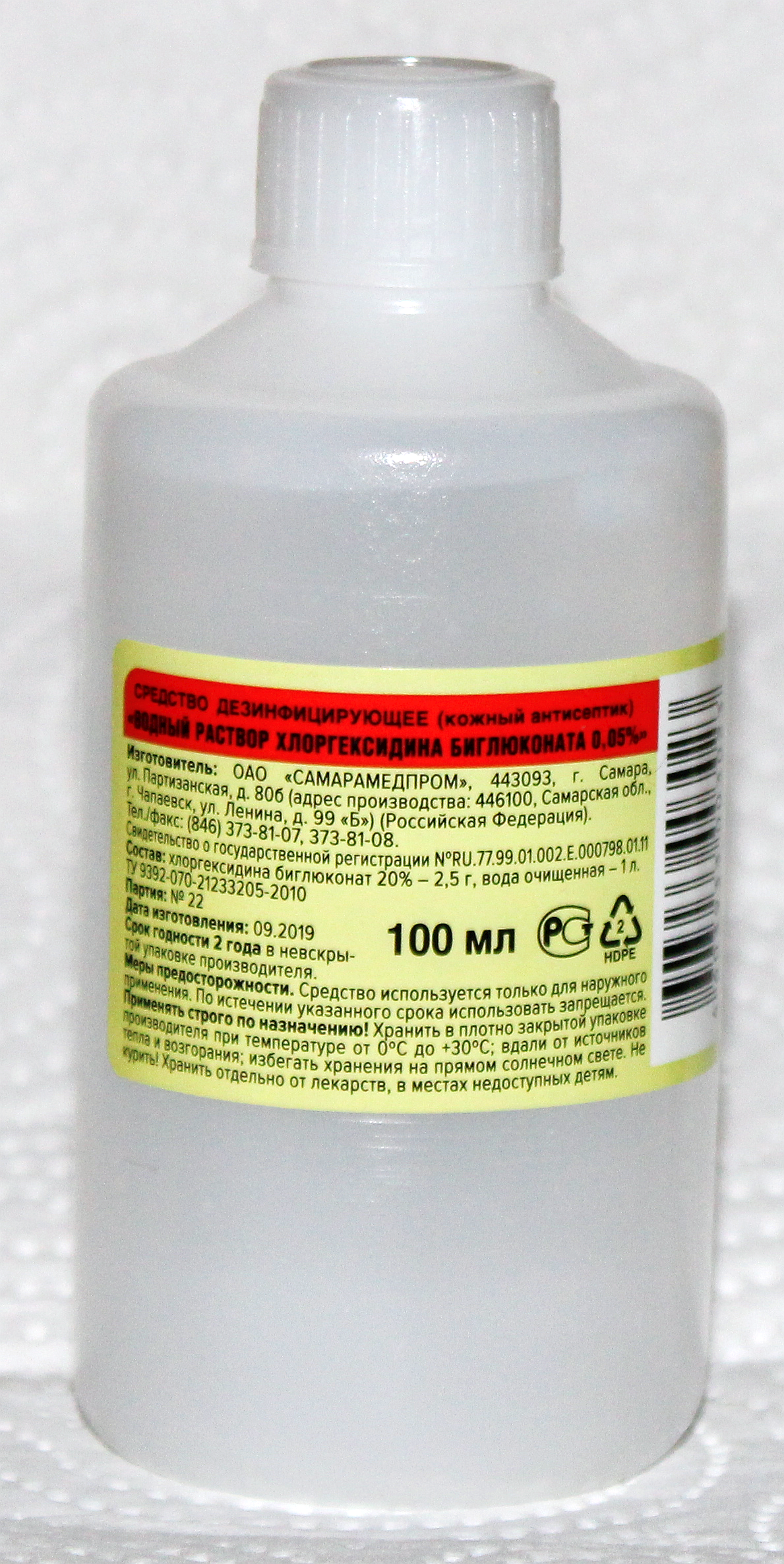 Хлоргексидина биглюконат